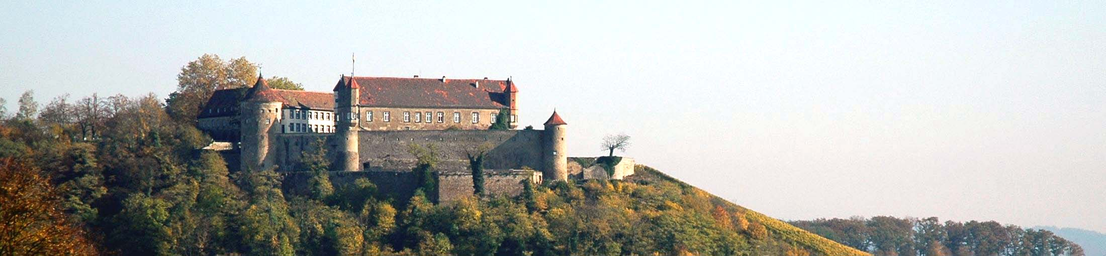 Burg Stettenfels